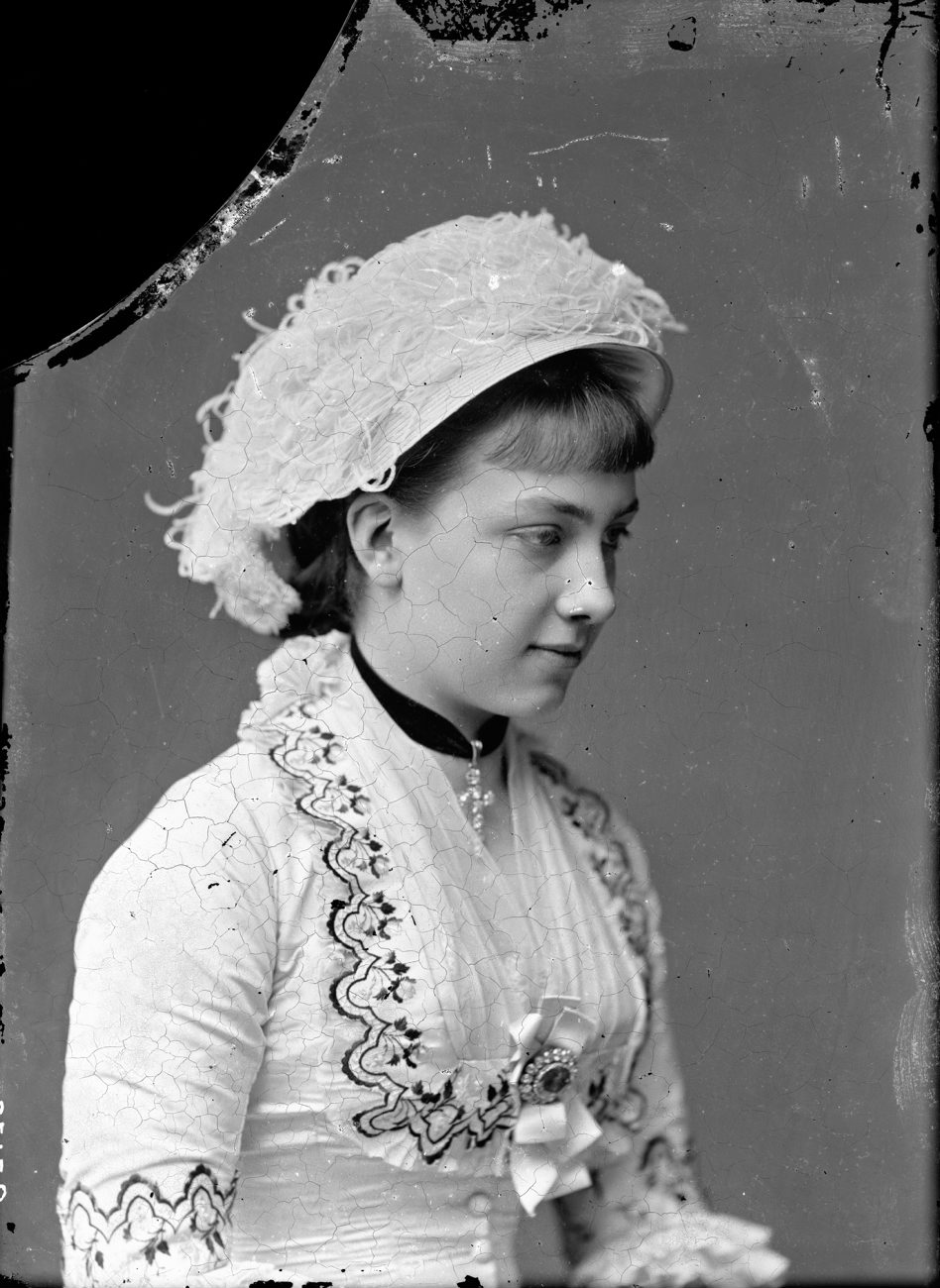 Victoria von Baden 1879 in Karlsruhe